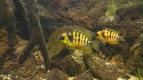 Cryptoheros nanoluteus , koppel in een aquarium